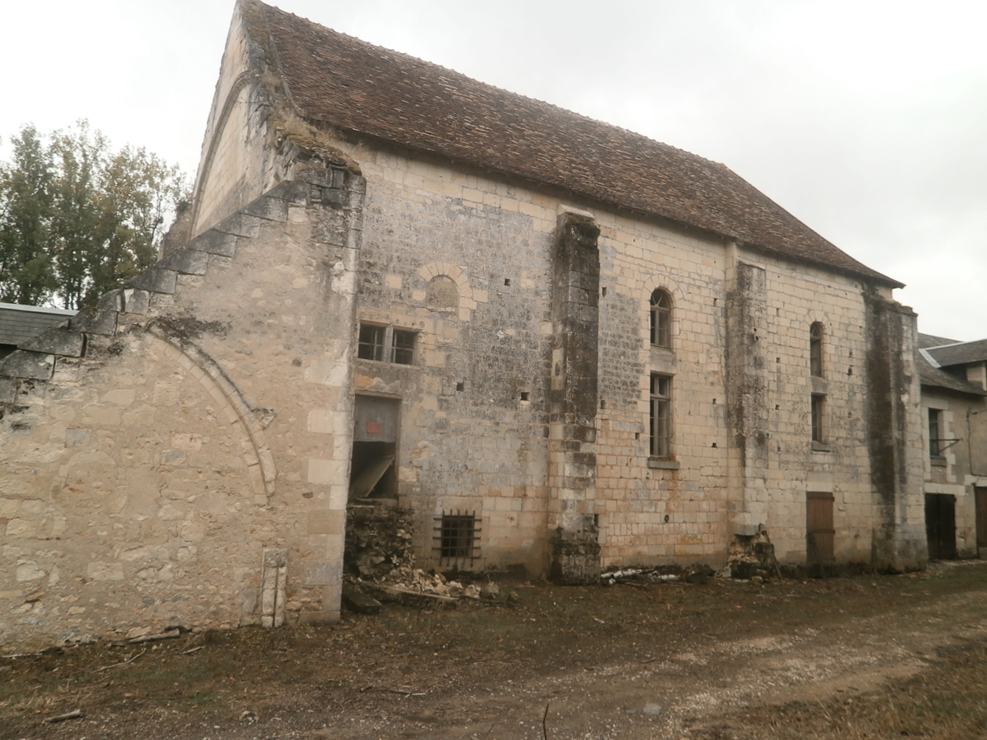 Vue générale de l'ancienne église abbatiale.